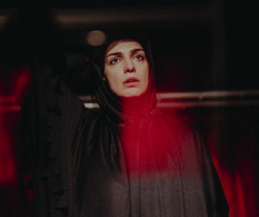 الیکا عبدالرزاقی در نمایش «مدِه آی سَن مِدار» به نویسندگی آنکا ویسده و کارگردانی بورژین عبدالرزاقی، پردیس تئاتر شهرزاد